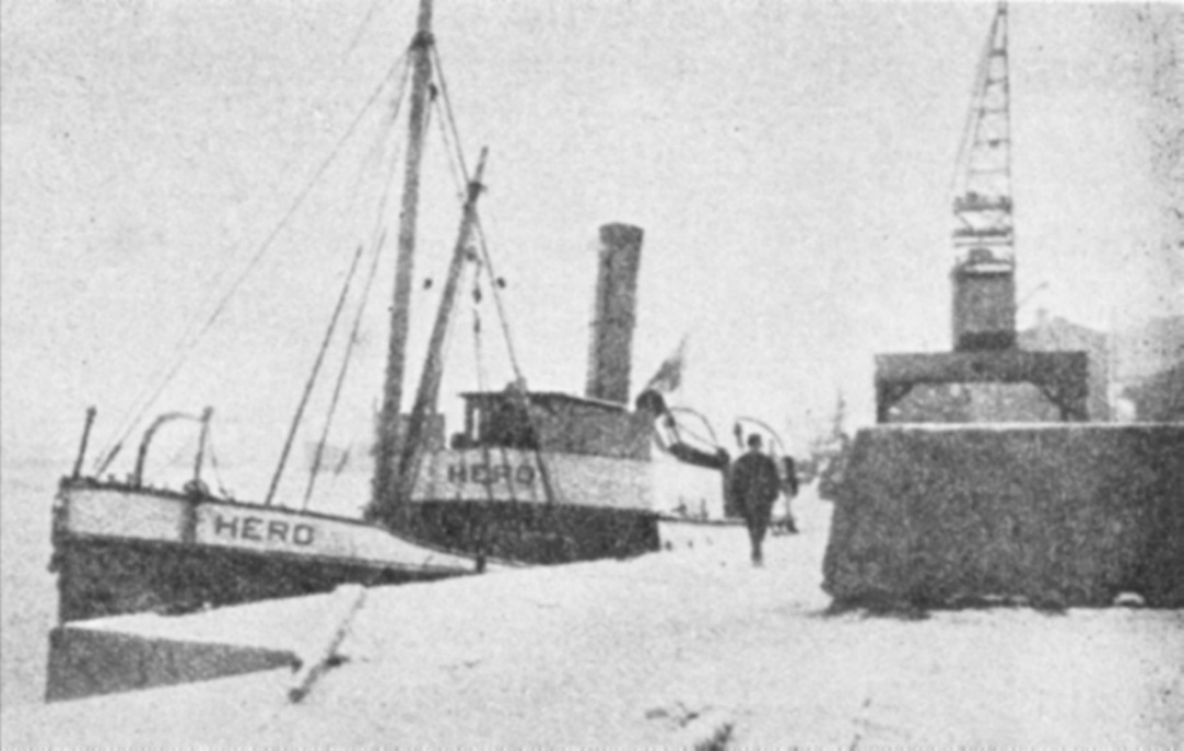 S/S Hero Tukholman satamassa, jonka oli määrä tuoda ase- ja miehistö apua Uudenkaupungin suojeluskunnalle Ahvenanmaalle.